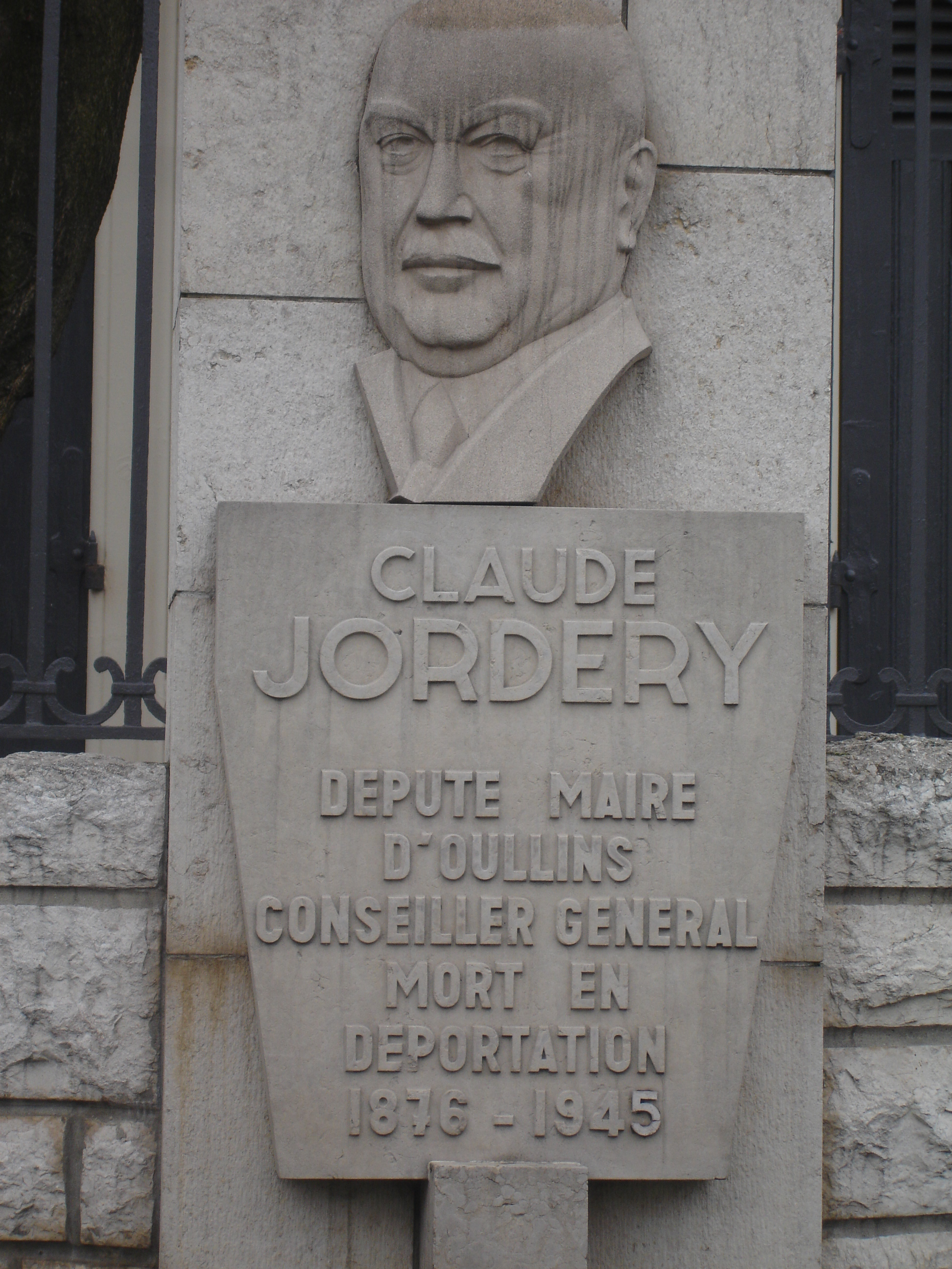 Oullins (69) : effigie de Claude Jordery